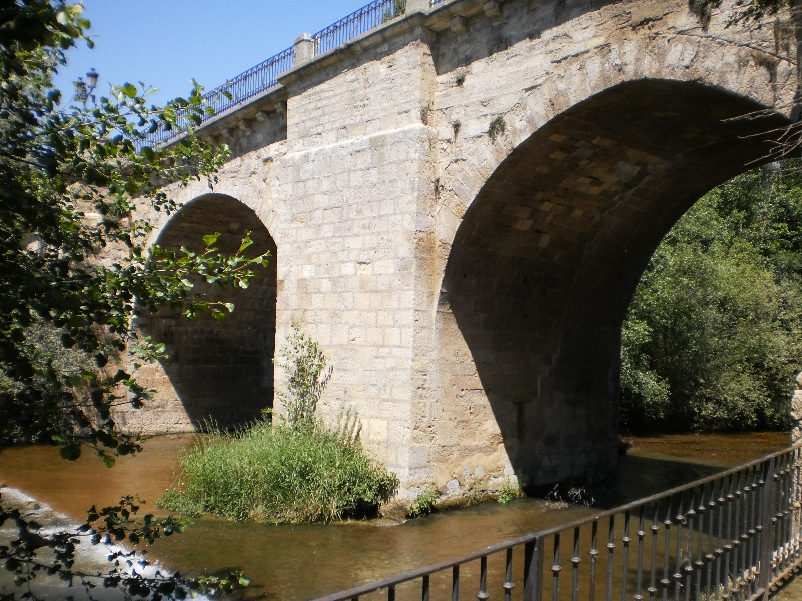 Puente Mayor de Carrión de los Condes